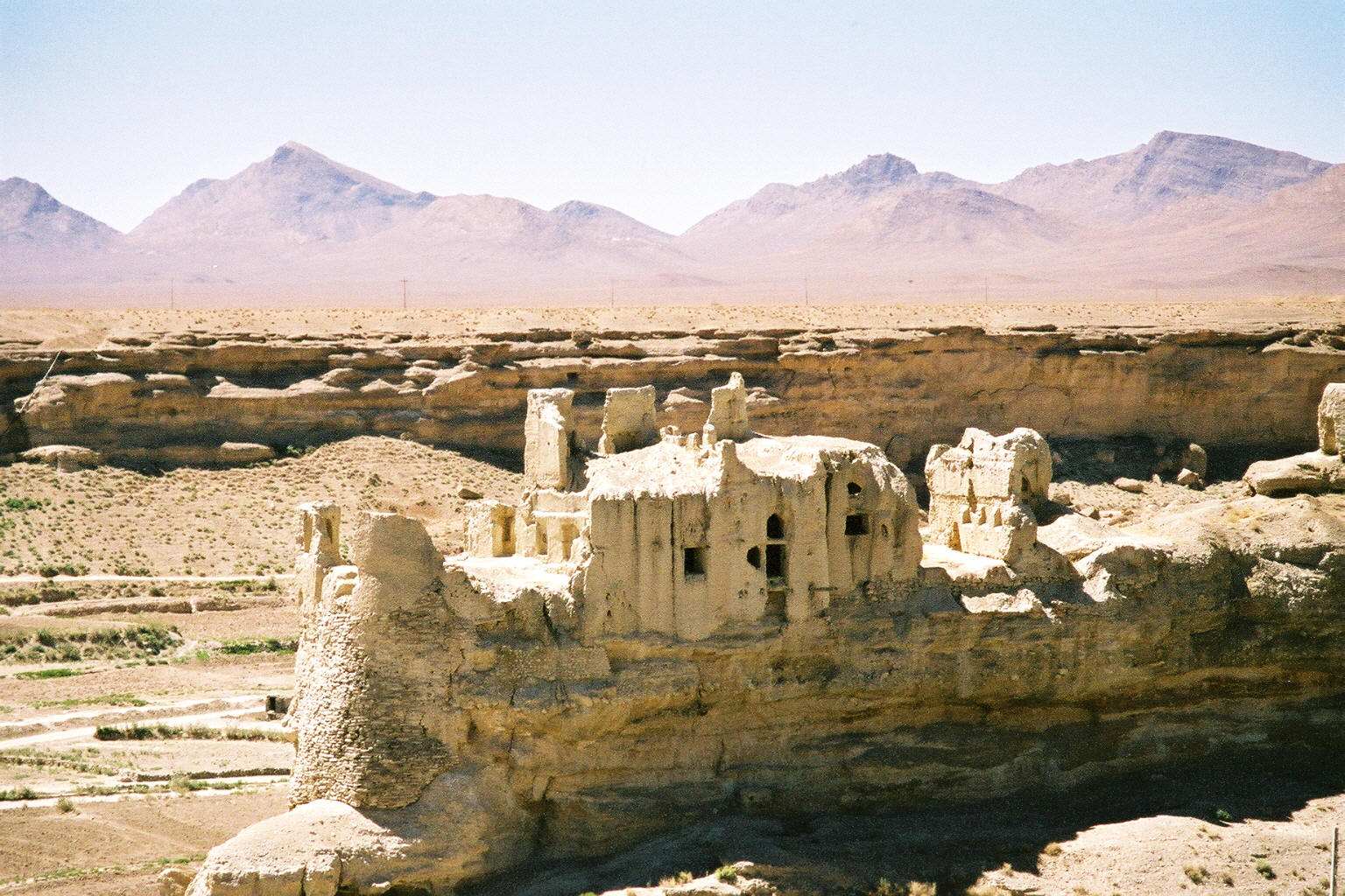 Ville fantôme d'Izadkhast (époque Sassanide)